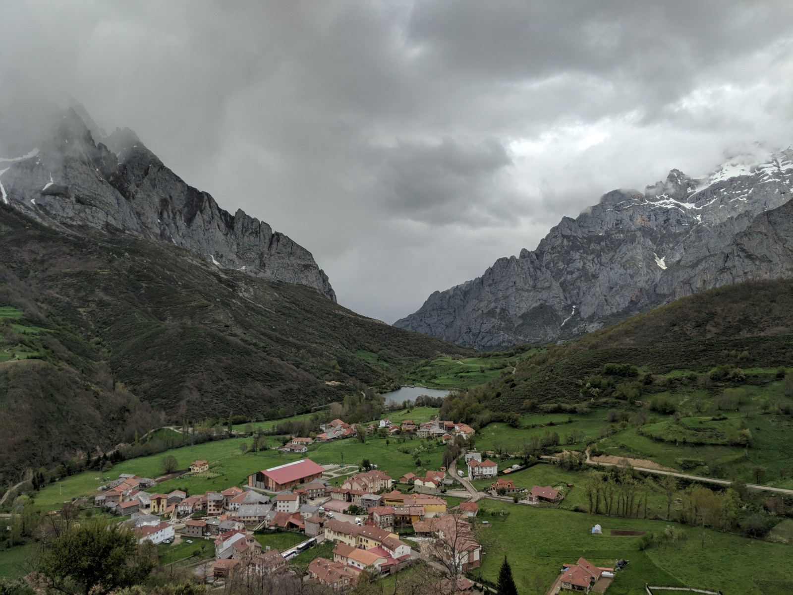 Foto sacada en Posada de Valdeón, antes de una tormenta This is a photography of a Special Area of Conservation in Spain with the ID: ES4130003. Natura2000 entry, EEA entry